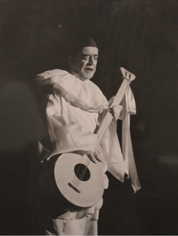 Carlo Dapporto in versione Pierrot sul palco del Teatro Nuovo a Salsomaggiore